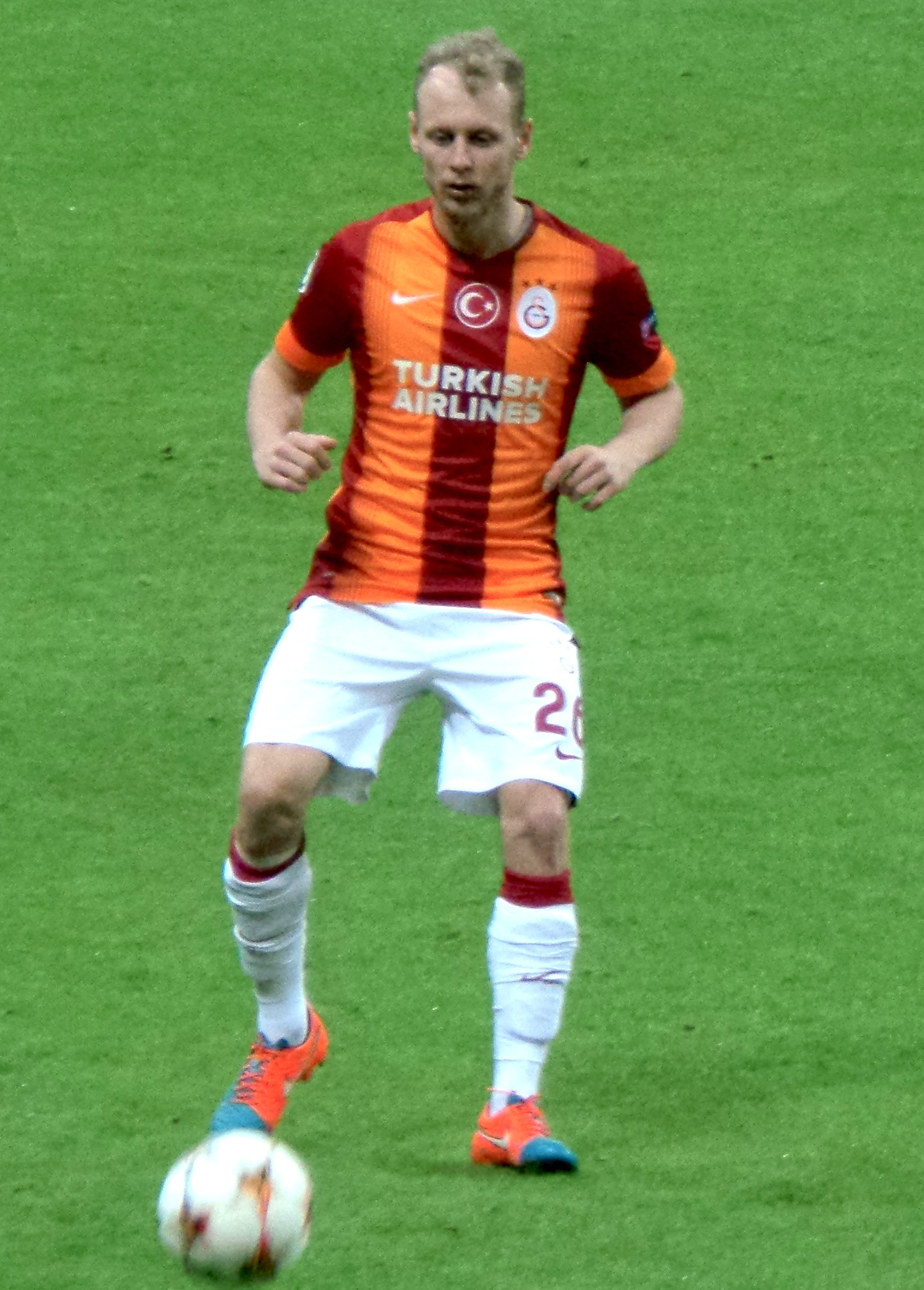 Semih Kaya